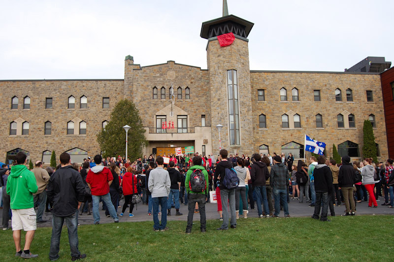 Piquetage au Cégep Saint-Jean-sur-Richelieu